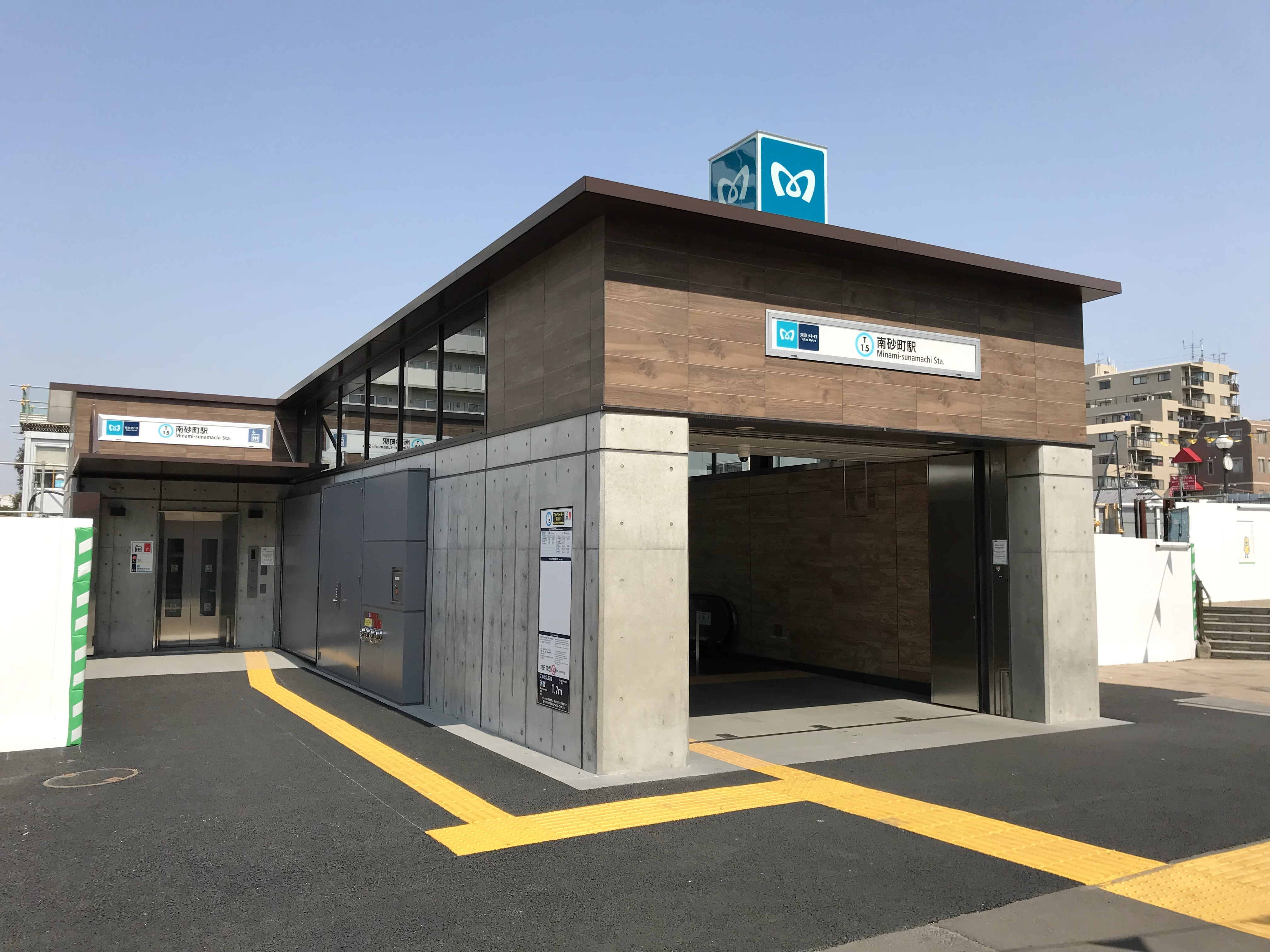 東京メトロ東西線南砂町駅3番出入口